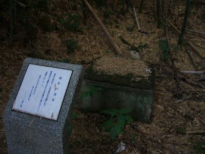 sakurai_no_simizu桜井の清水